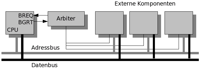 Zugriffssteuerung für den Systembus mittels eines Arbiters